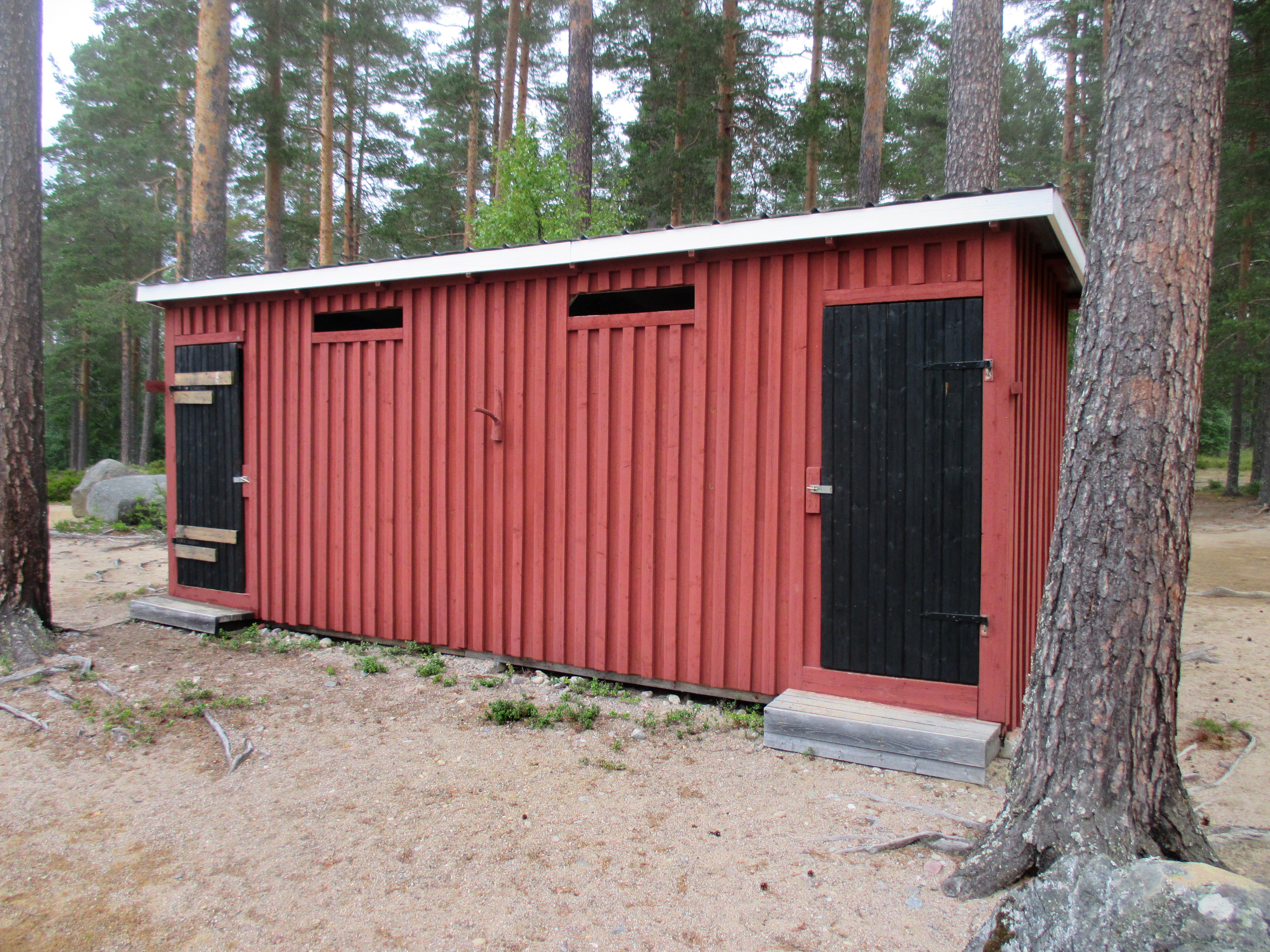 Badhytt på badplatsen vid Sidsjön, Källsjön, Ockelbo kommun, Gästrikland, Gävleborgs län, Sverige.